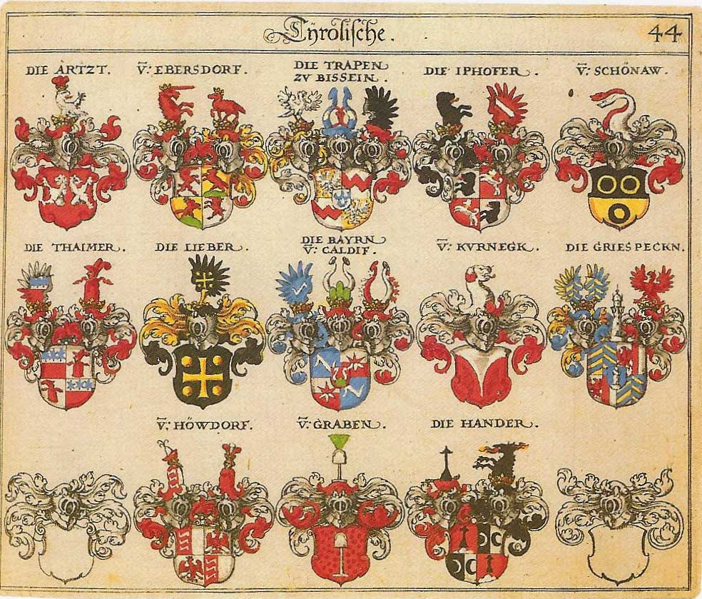 Siebmachers Wappenbuch, 1605. Tafel aus Teil 1, Blatt 44, 13: Wappen der Herren von Graben.